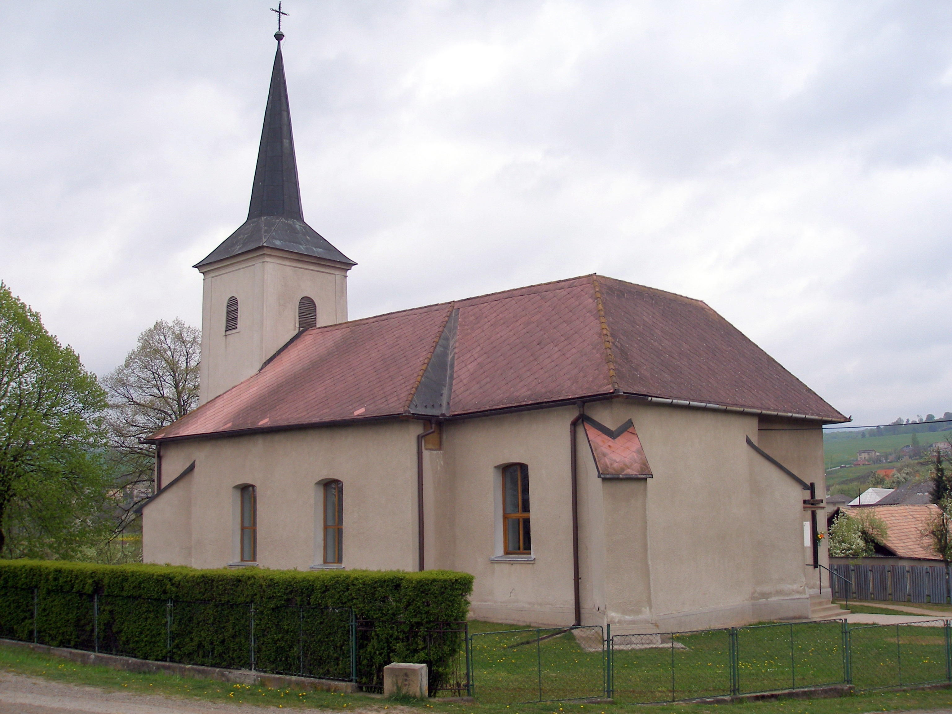 Obec Malý Slivník okres Prešov región Šariš